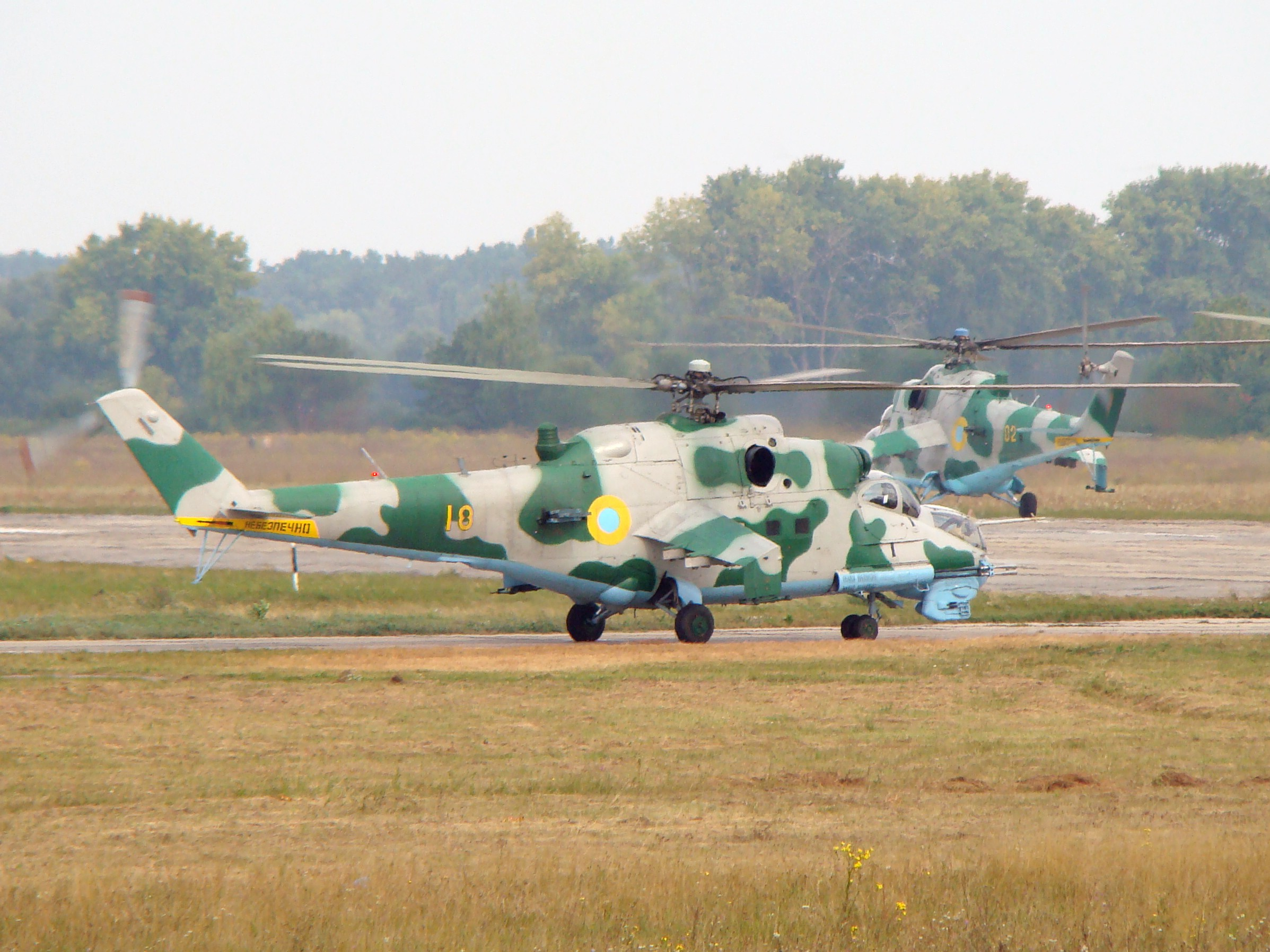 Ми-24 Украинской армии